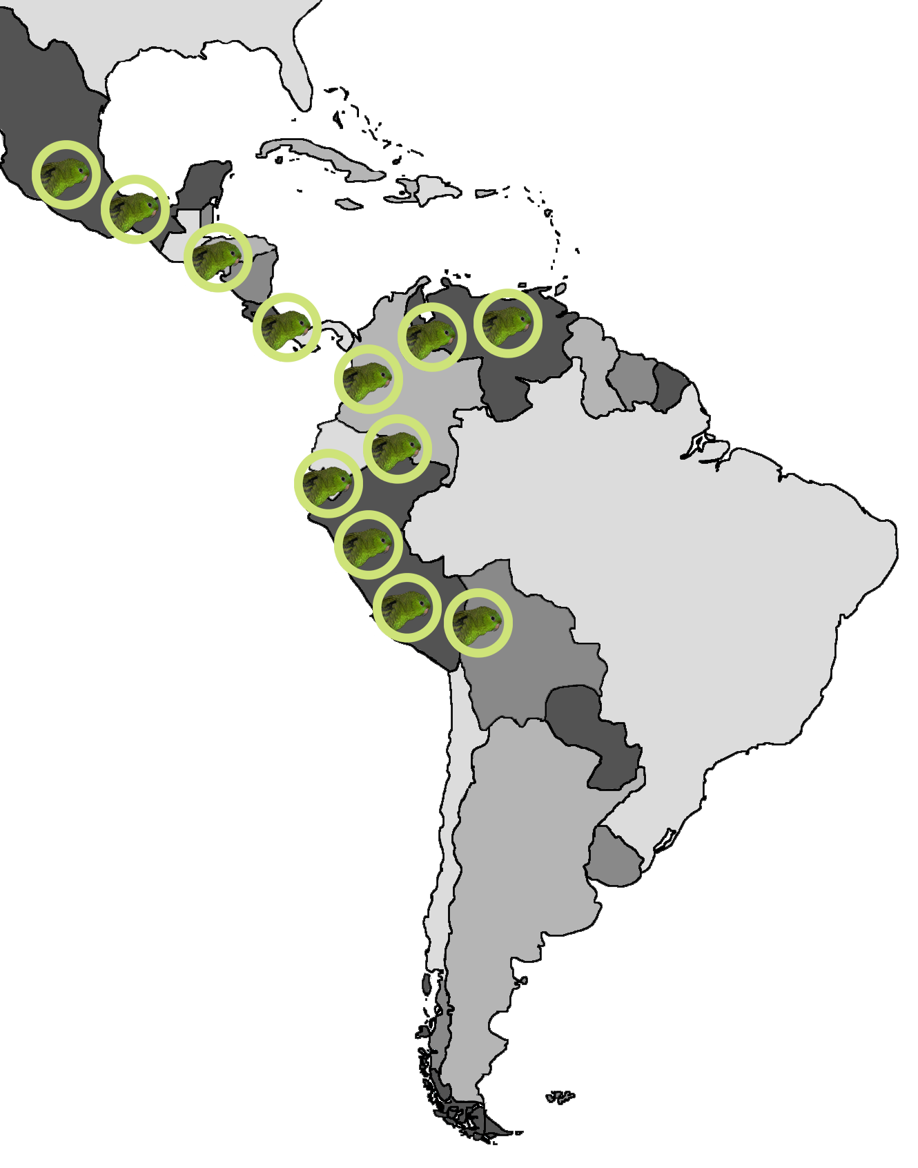 Verbreitungsgebiet